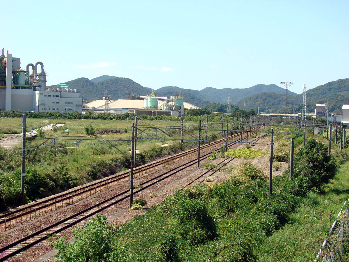 JR貨物 西浜駅